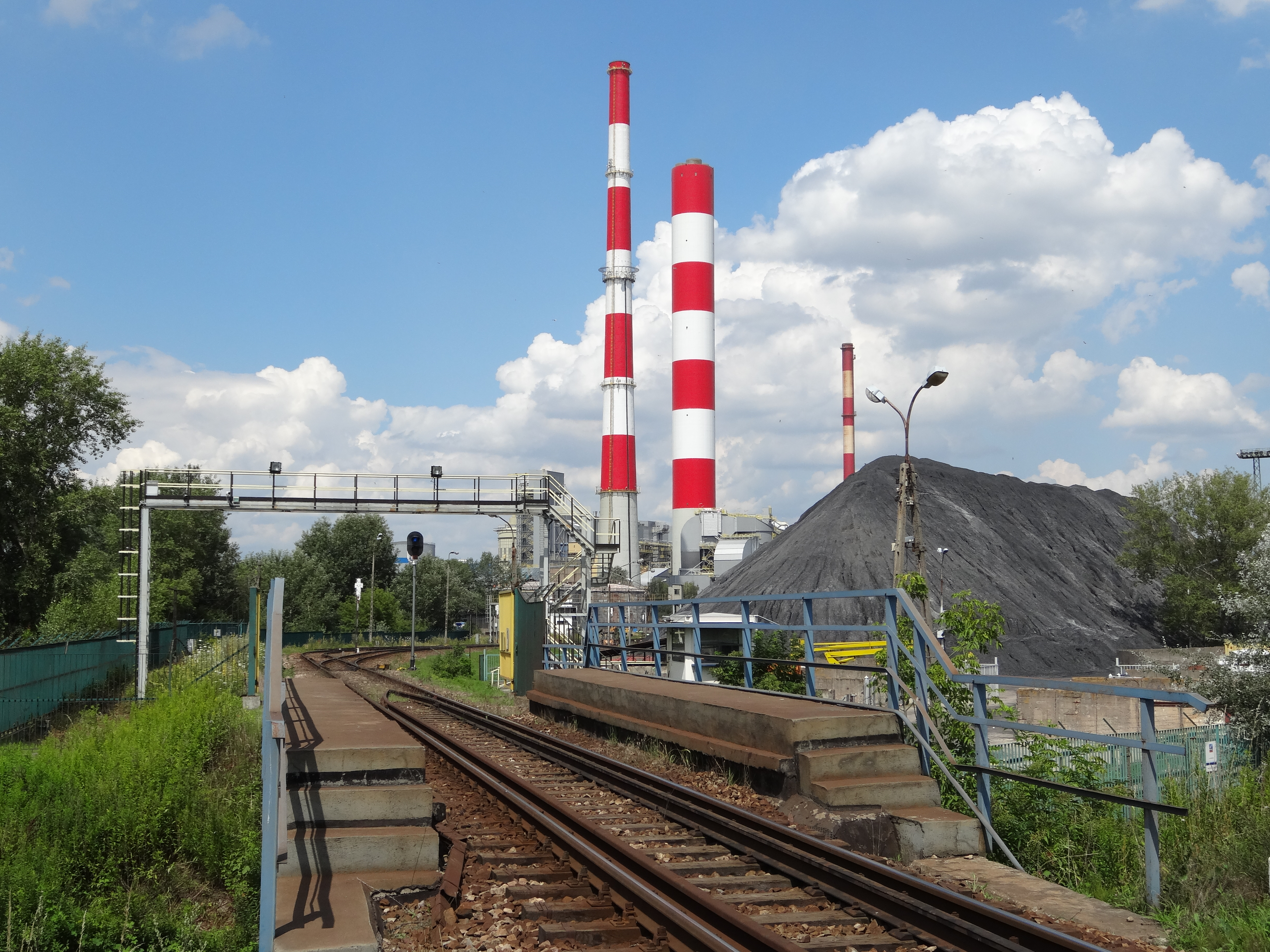 Augustówka, Warsaw, Poland